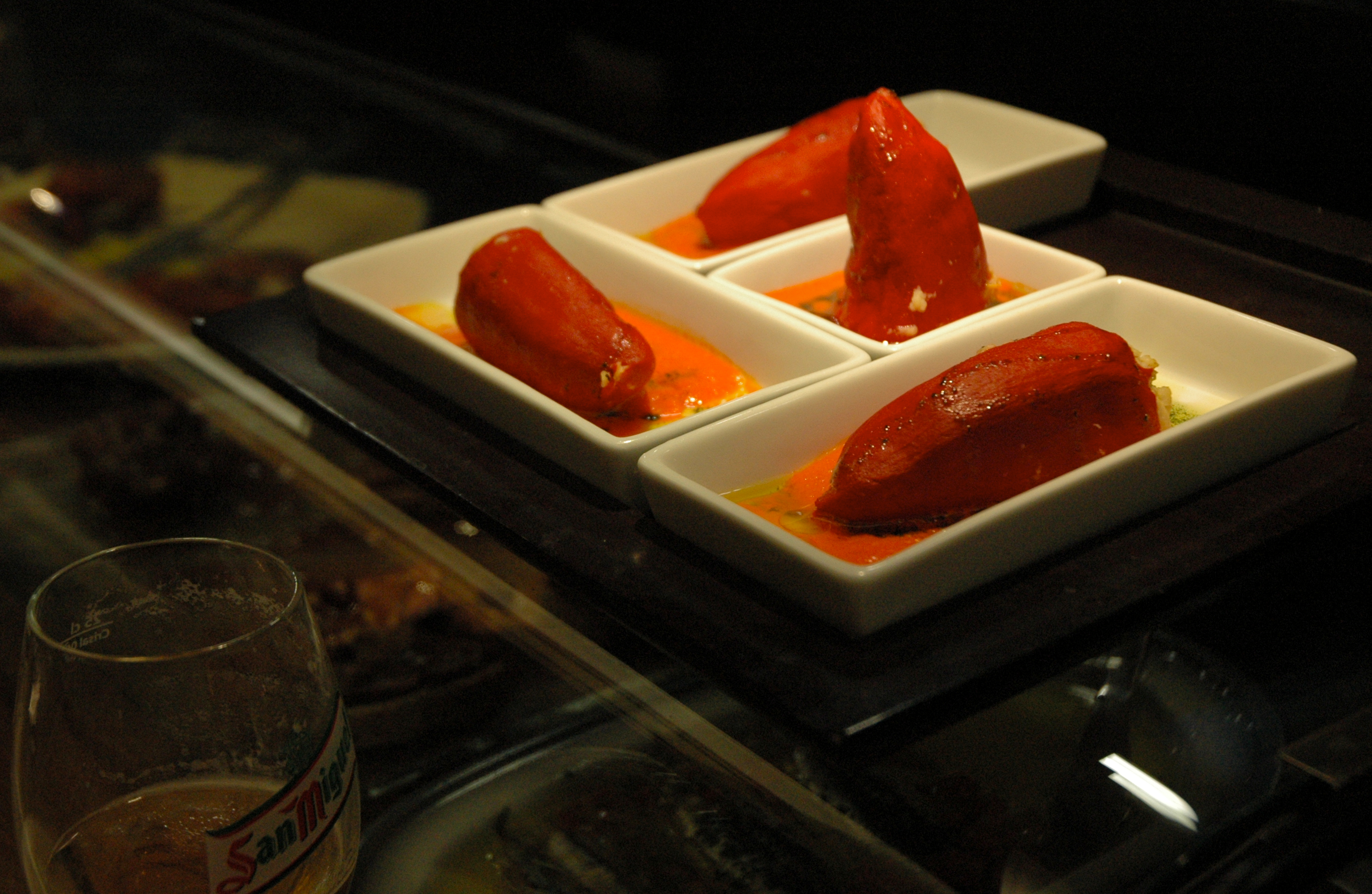 Pamplona Diciembre 2006